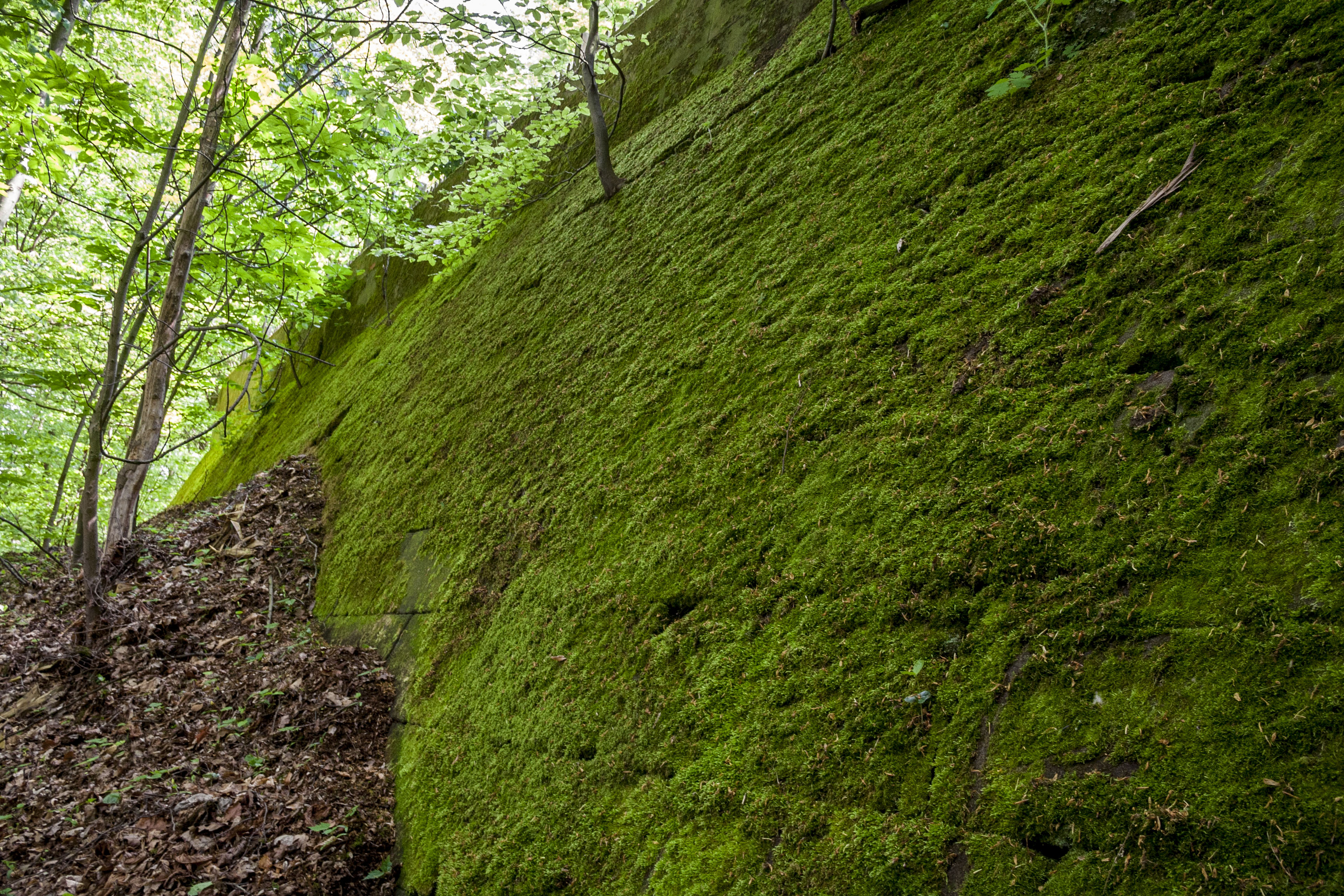 Stadtwald Fürth, Landschaftsschutzgebiet, Fürth, Oberfürberg, Zirndorf, Reste der Mauer